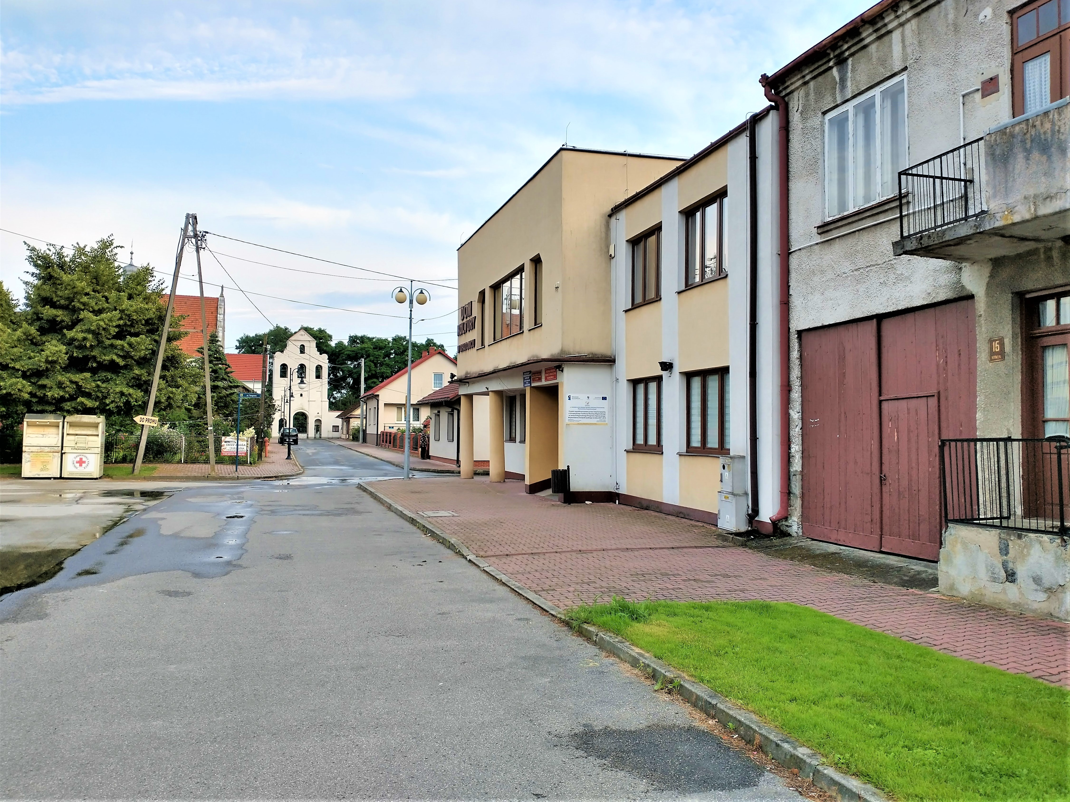 Rynek w Opatowcu.